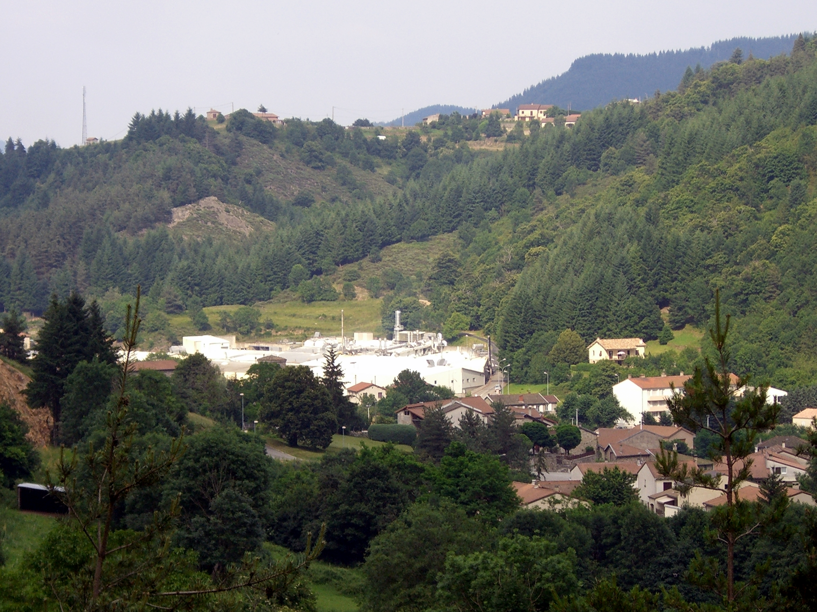 Le quartier du Pont-de-Fromentières à Mariac.